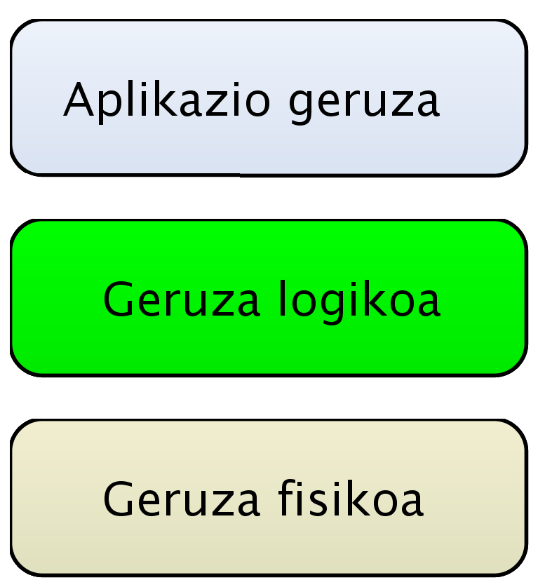 DBKS gehienek bezala MySQL-ek duen egitura logikoa